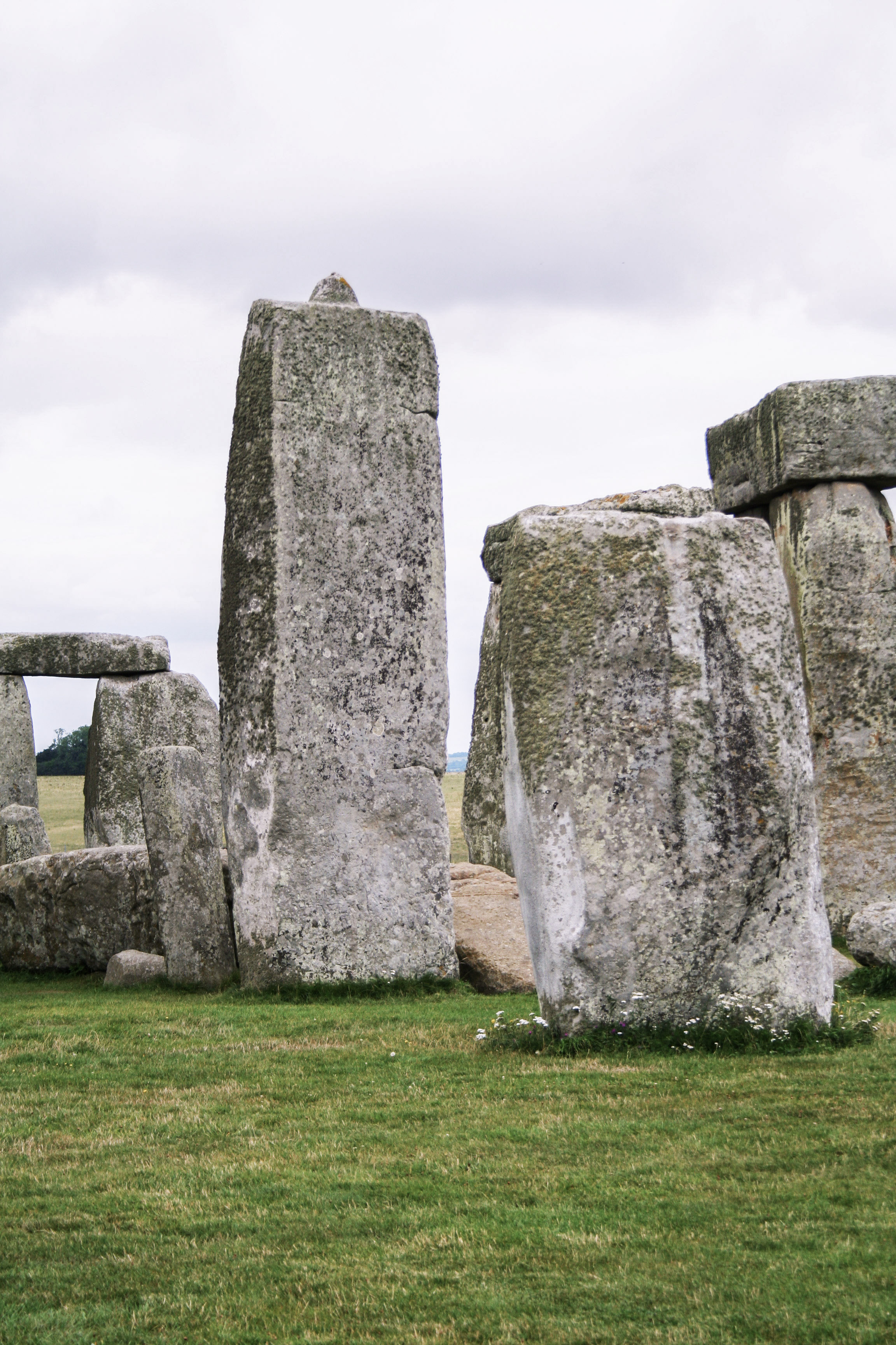 Tragstein eines Trilithen mit Zapfen bei Stonehenge. Die Decksteine der Trilithen erhielten eine leichte Krümmung und Löcher, sowie Nut- und Federverbindungen, um sie in die Zapfen der Tragsteine einzupassen und mit den Ecksteinen zu verkeilen.